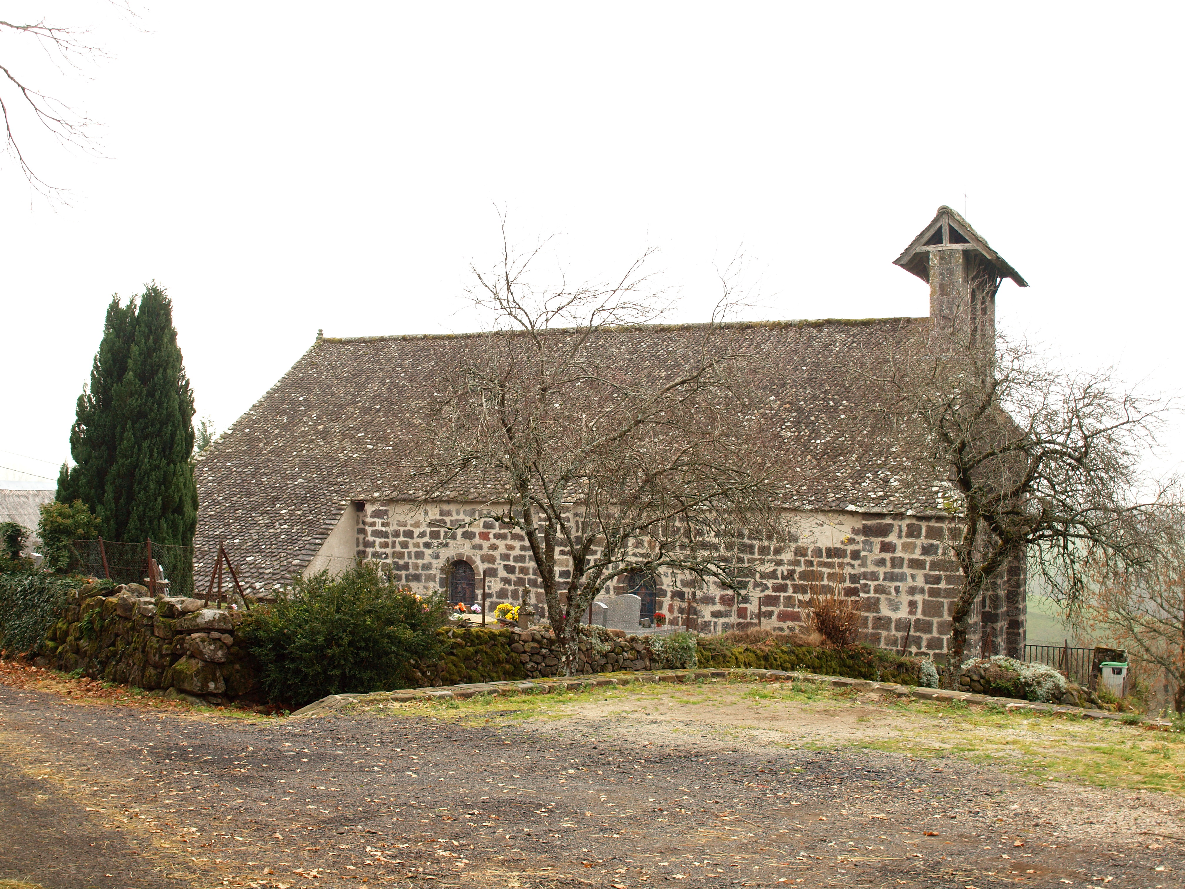 Girgols (Cantal, France)